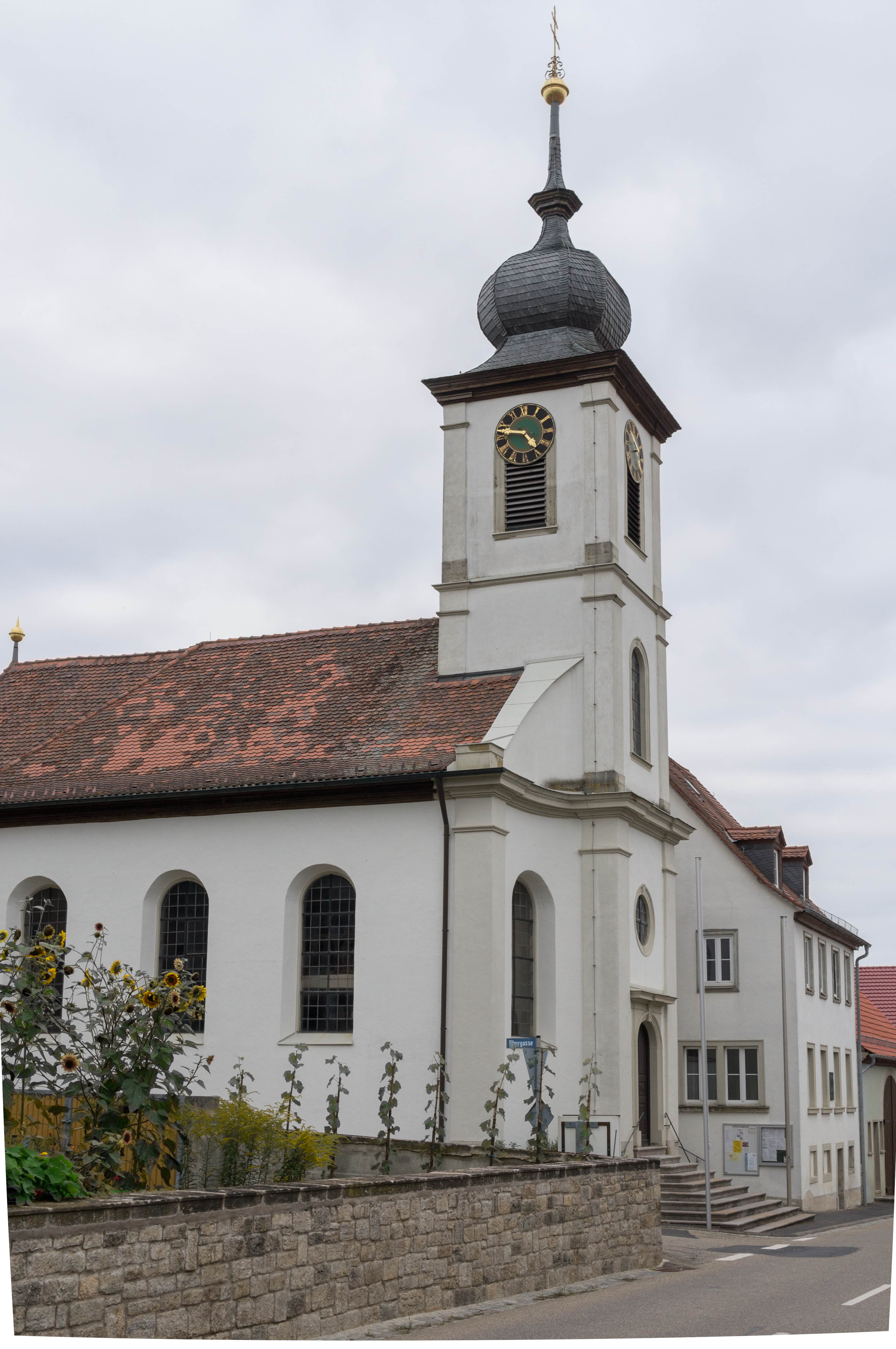 Kuratiekirche Unbefleckte Empfängnis Mariens, Ingolstadt (Unterfranken), Gemeinde Giebelstadt This is a photograph of an architectural monument.